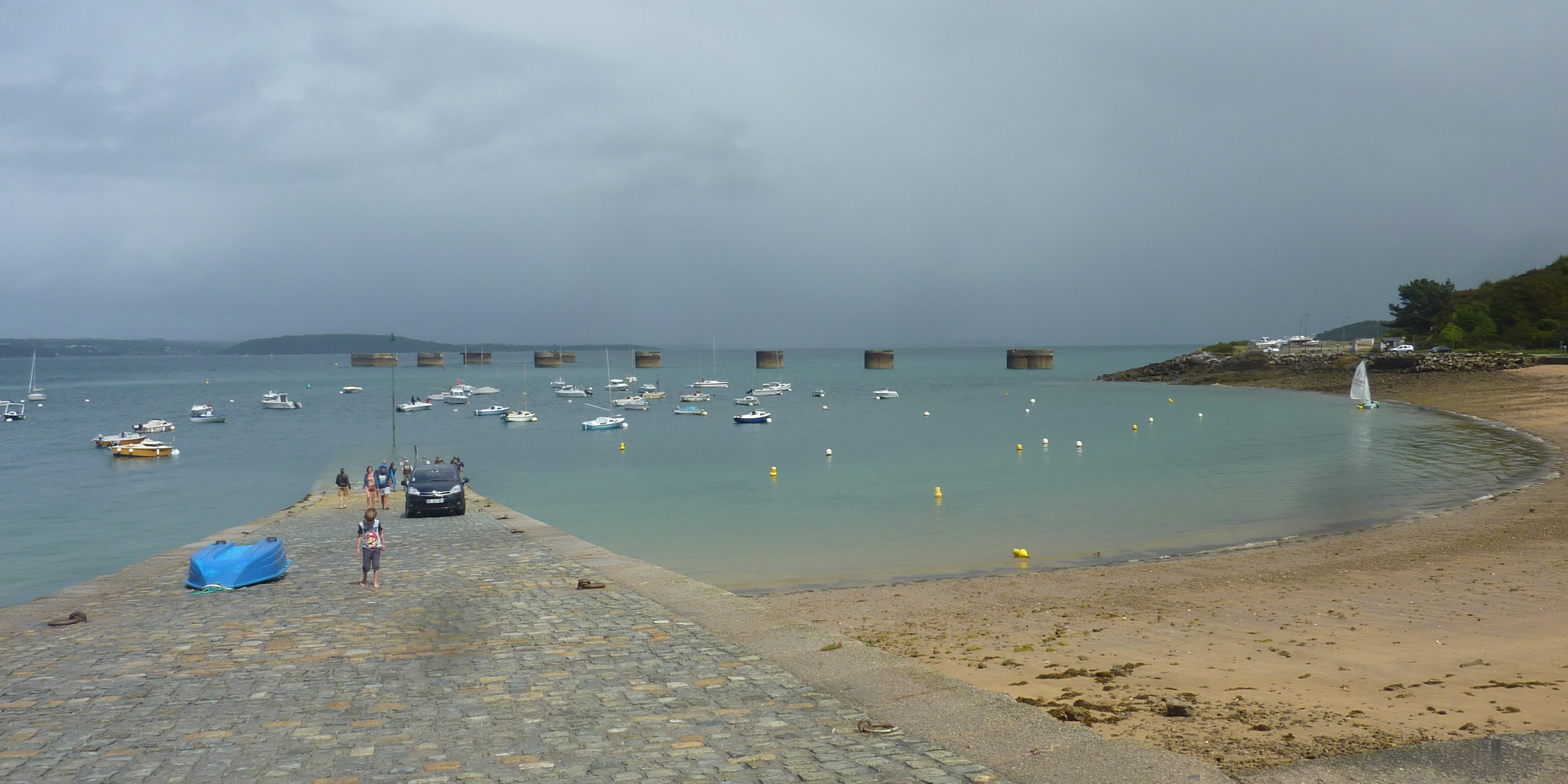 Les restes de l'appontement pétrolier de Lanvéoc : les deux ducs-d'Albe et les six gabions ; au premier plan, la cale du port de Lanvéoc